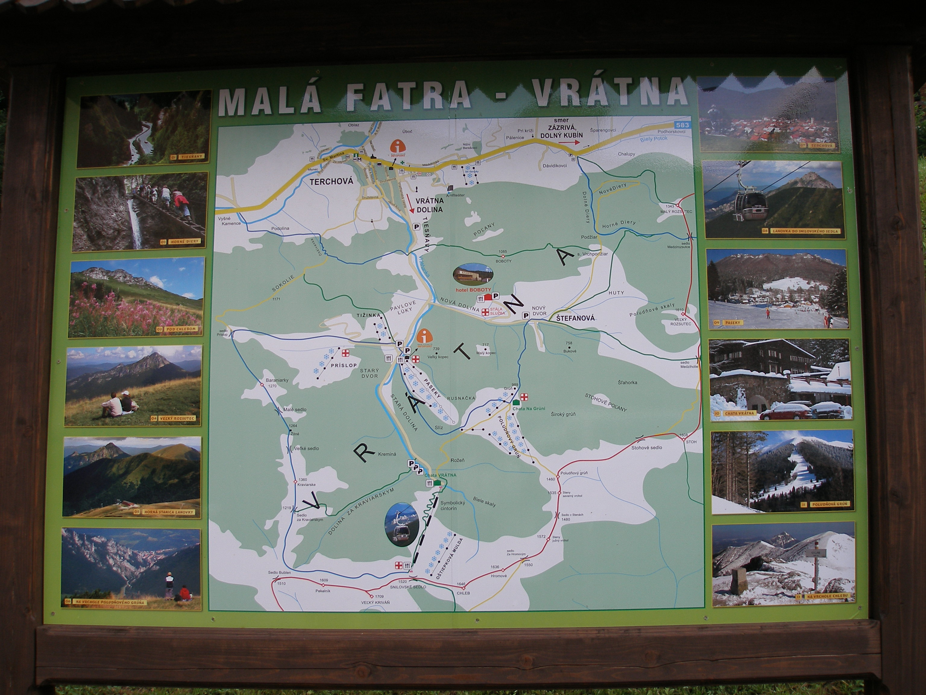 Vrátna dolina v pohorí Malej Fatry, verejná turistická orientačná mapa